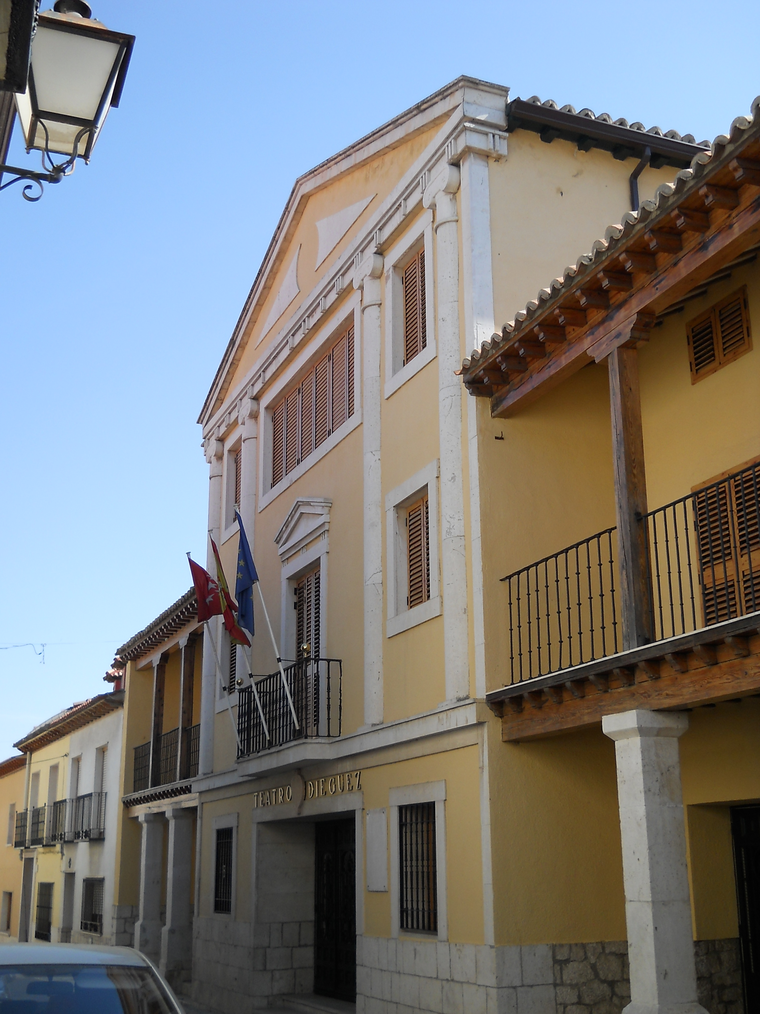 Teatro Dieguez, Colmenar de Oreja, Madrid, España